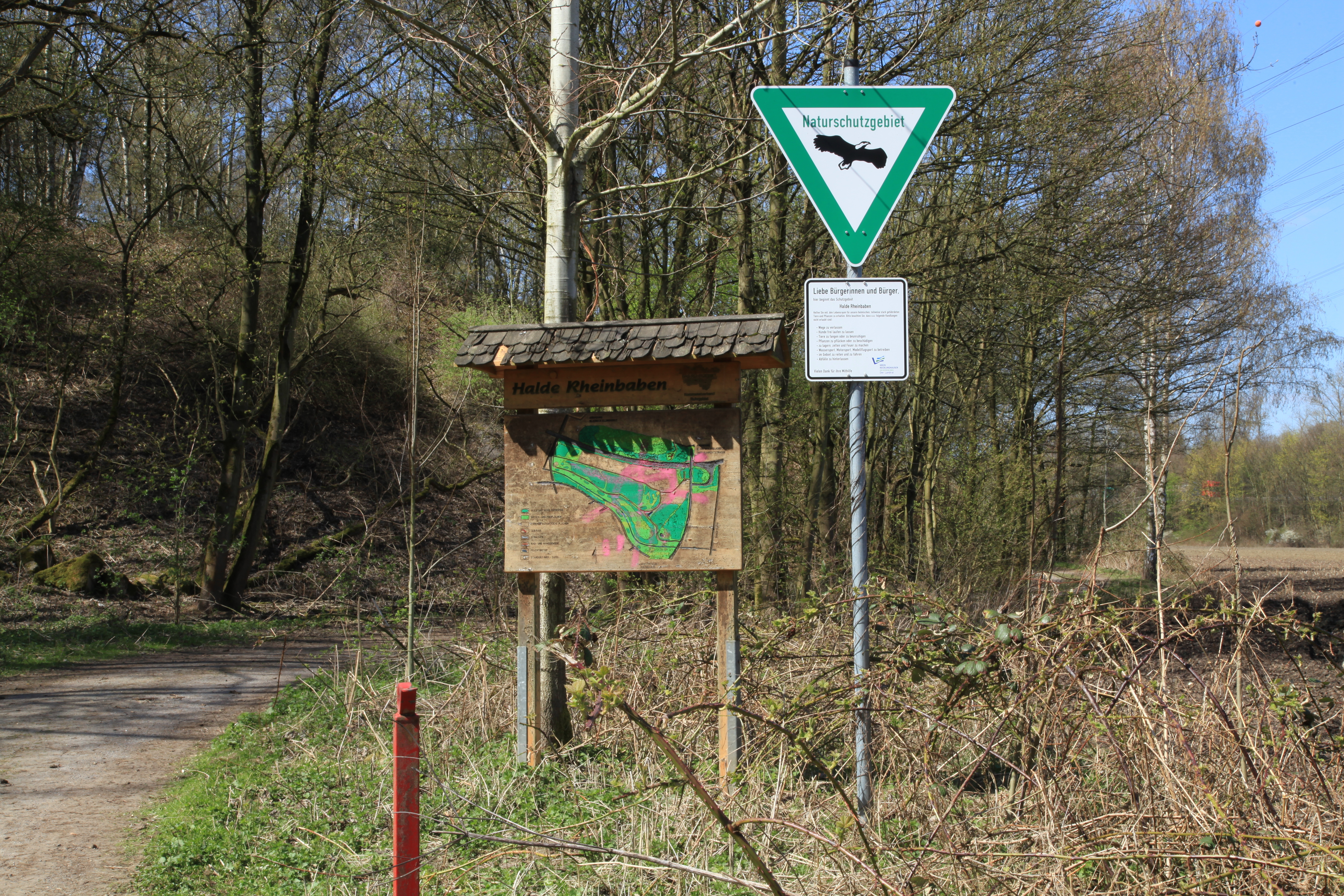 Halde Rheinbaben in Gladbeck an der Industriestraße in Bottrop